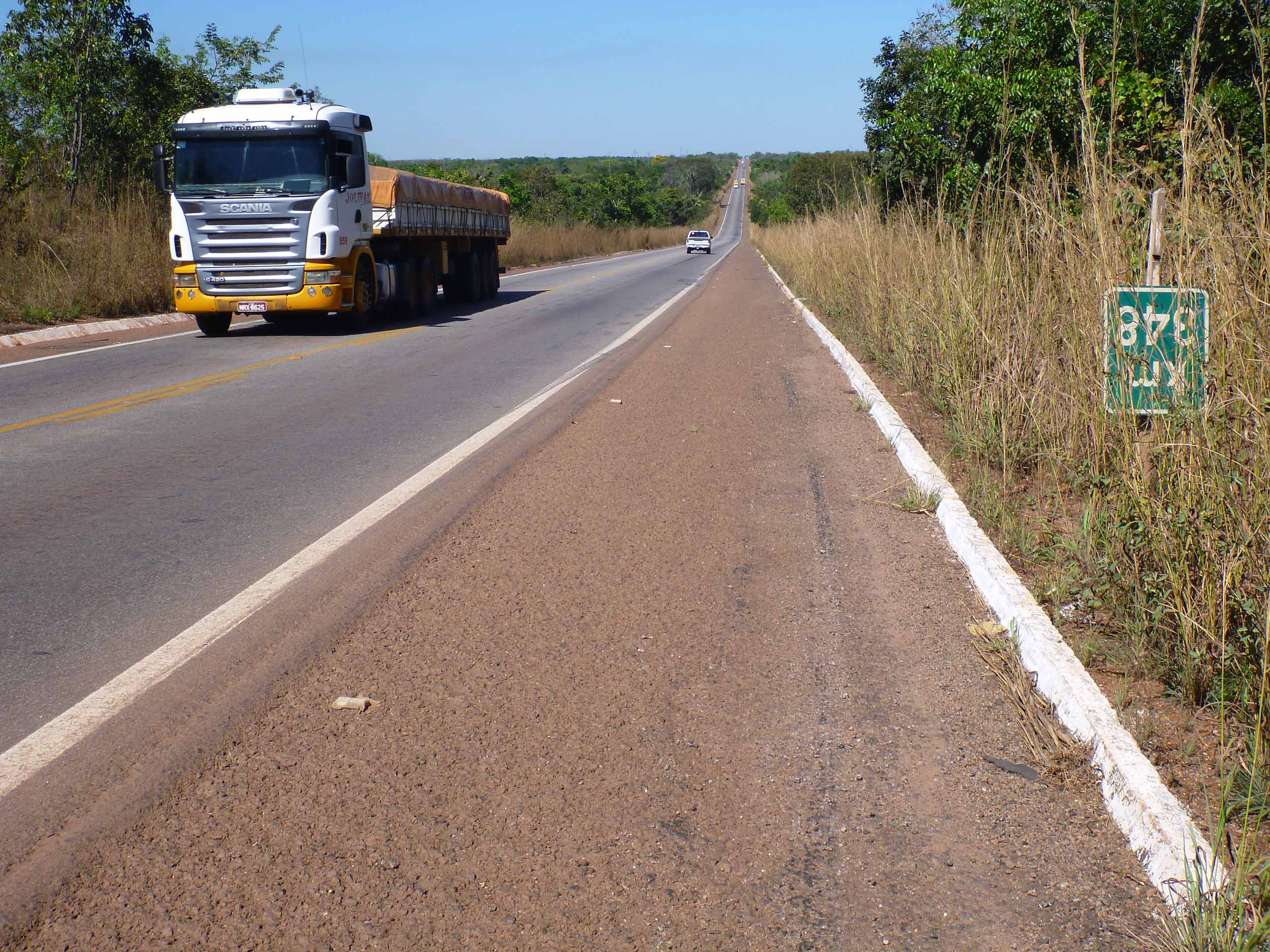 Trecho da rodovia federal brasileira BR-153 no estado do Tocantins.